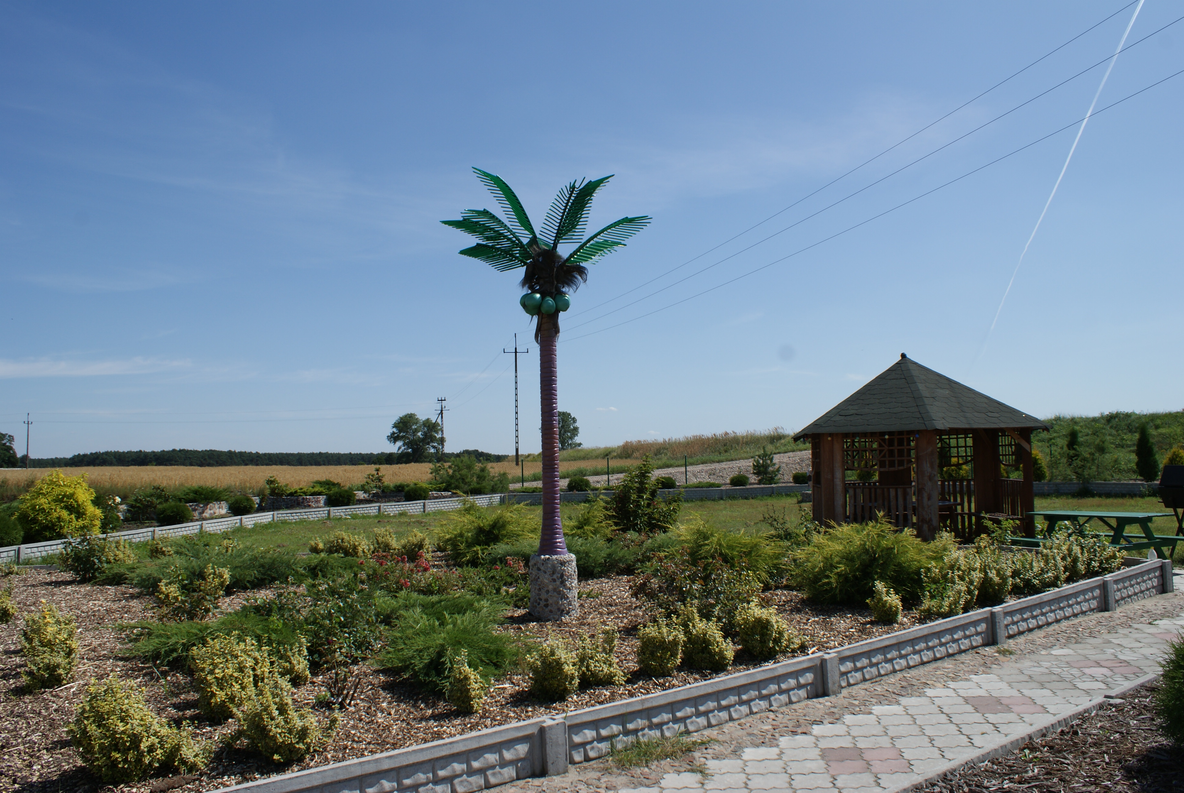 Solec – wieś w Polsce położona w województwie wielkopolskim, w powiecie średzkim, w gminie Krzykosy.